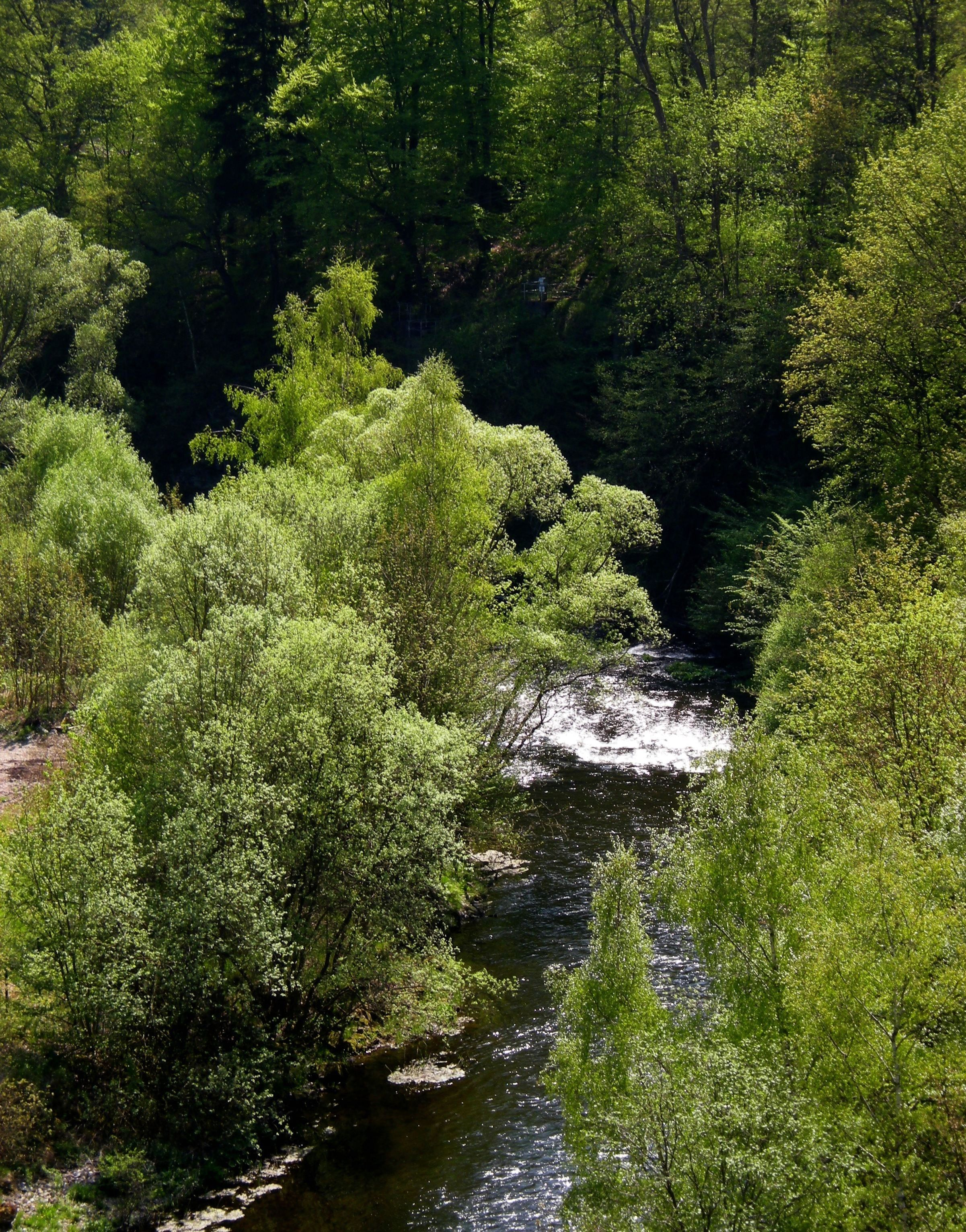 Bodeschlucht bei Thale.jpg